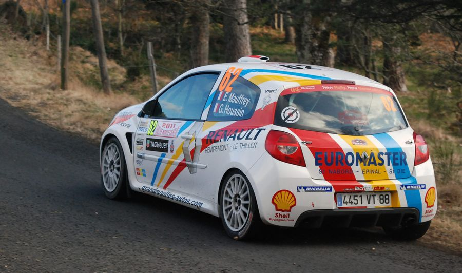 Eric Mauffrey au Monte-Carlo 2011